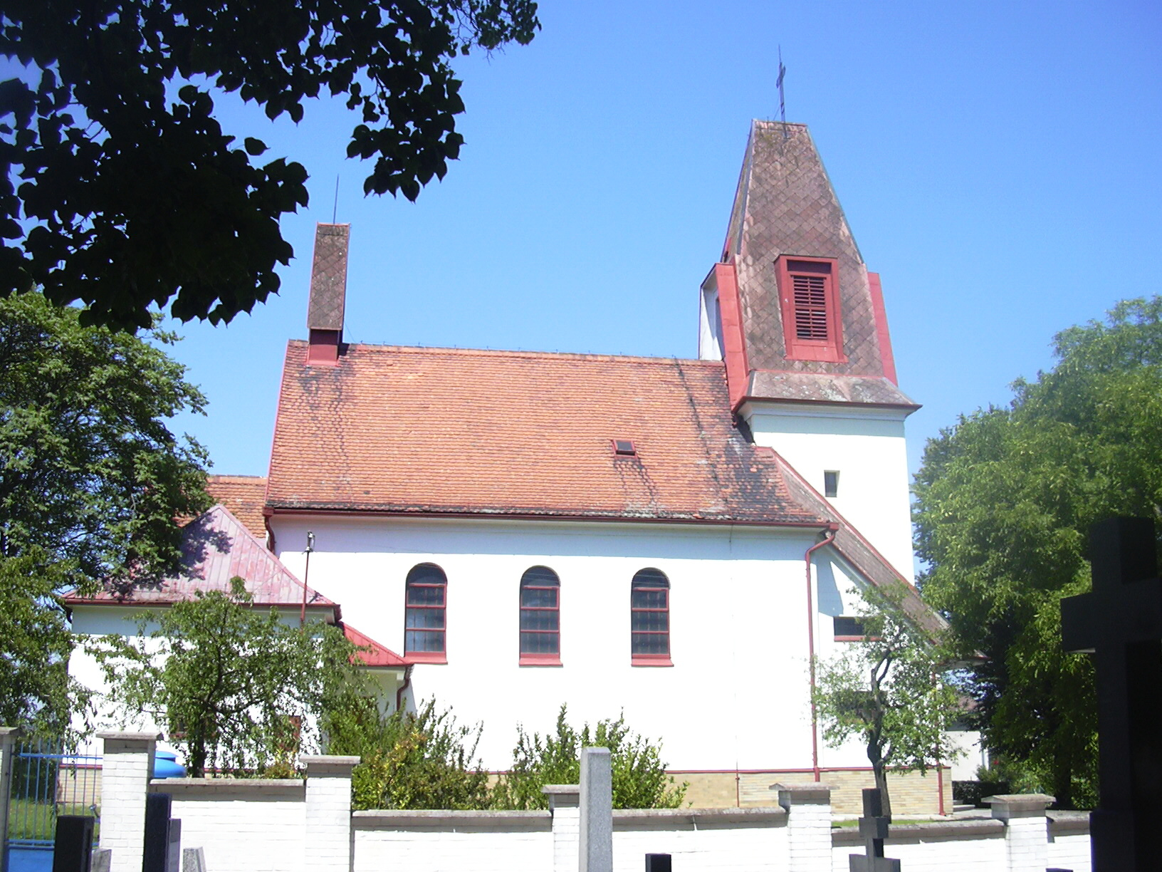 kostel sv. Václava Holubice (Vyškov- Czech republic)